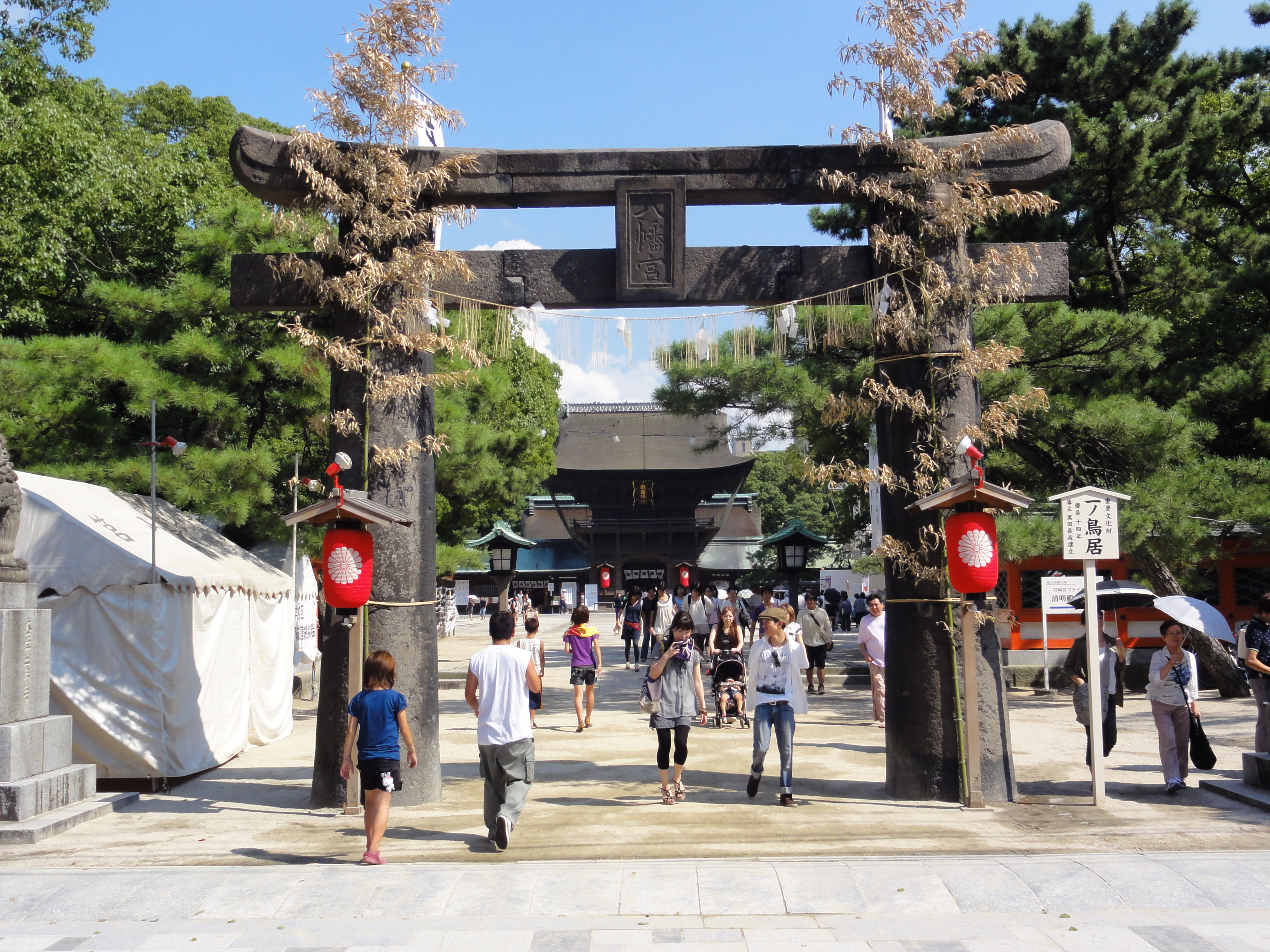 Hakozaki-gu Houjyoya ,Hakata 筥崎宮 放生会